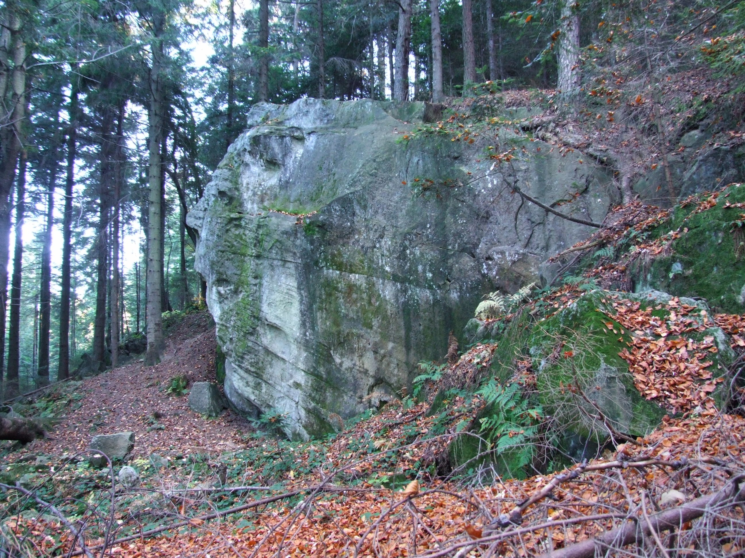 Diabli Kamień na Krzywickiej Górze